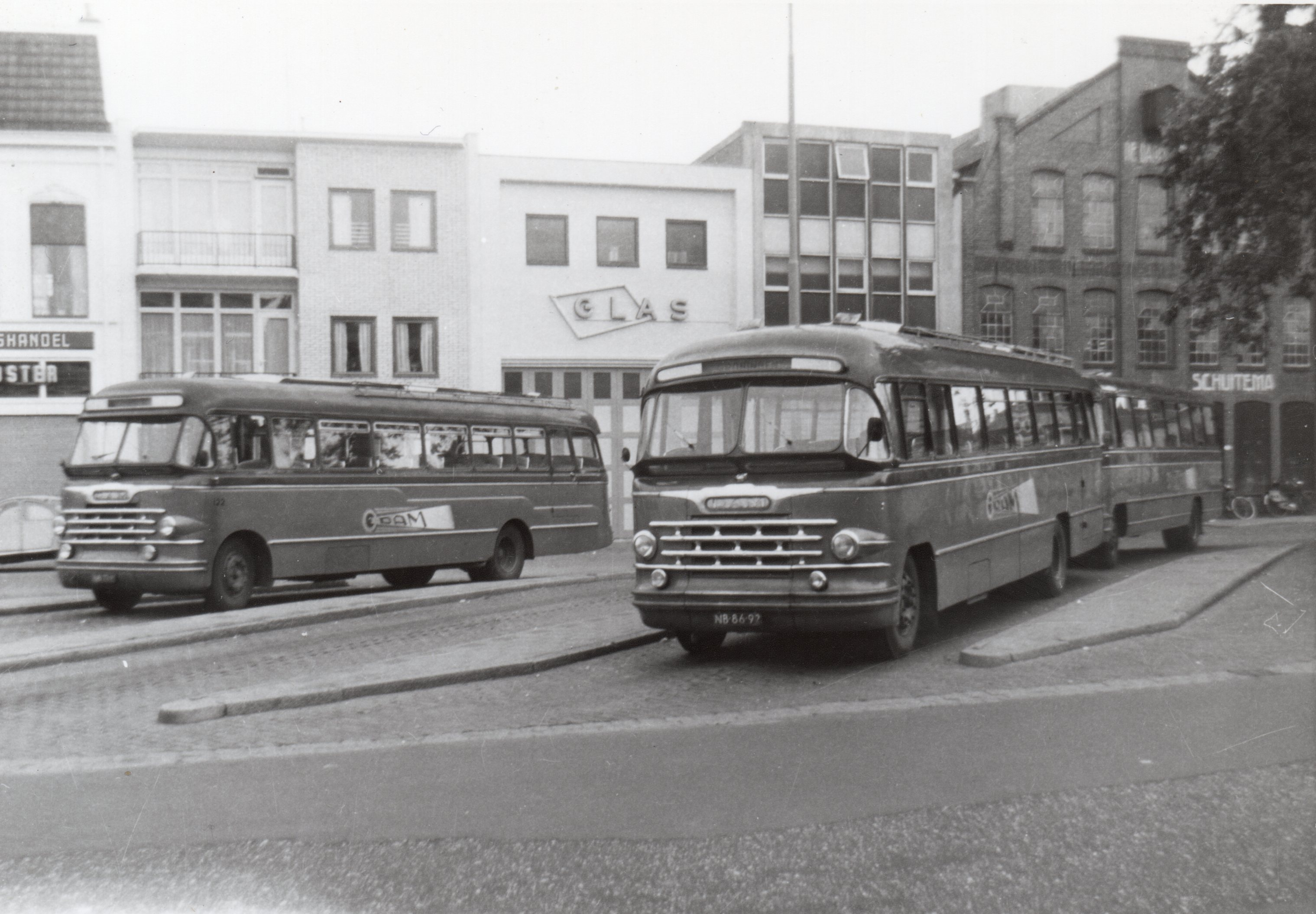 DAM-bussen 122 en 119, Scania-Vabis /Medema bouwj. 1954 resp. 1953, aan het Damsterdiep in Groningen in augustus 1965. Achteraan bus 138, DAF/Smit App, bouwj. 1960